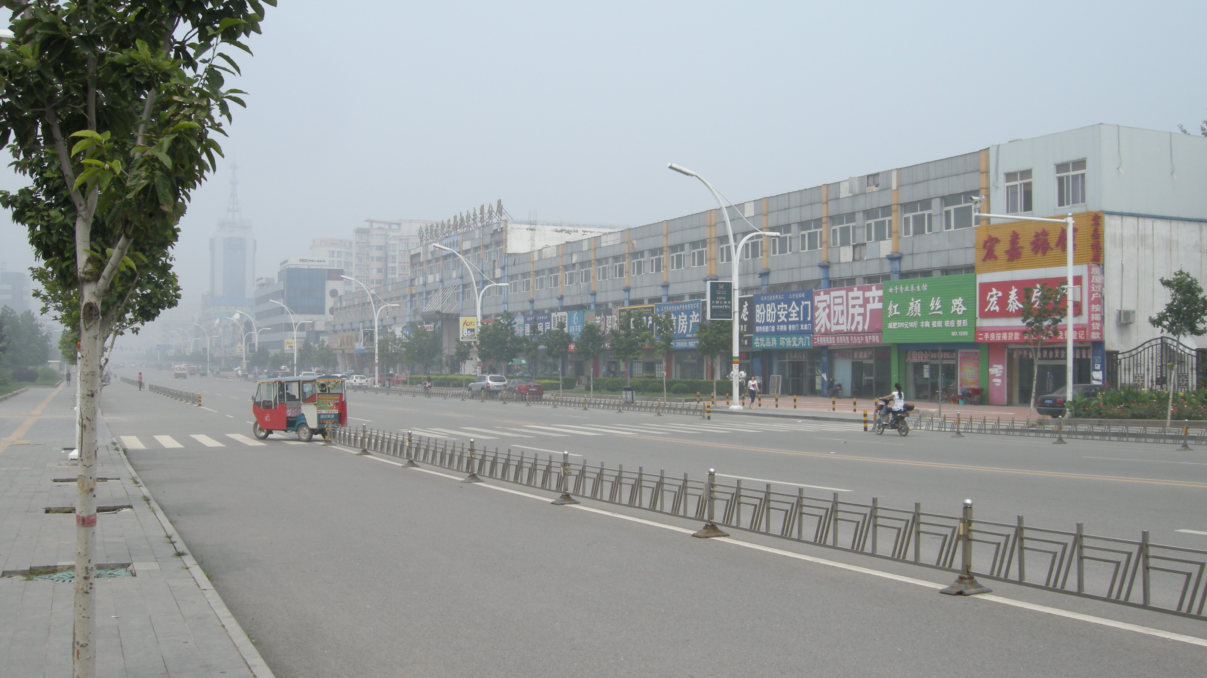 三河迎賓路 Motorcycle Taxi in Sanhe 三河のオートバイタクシー